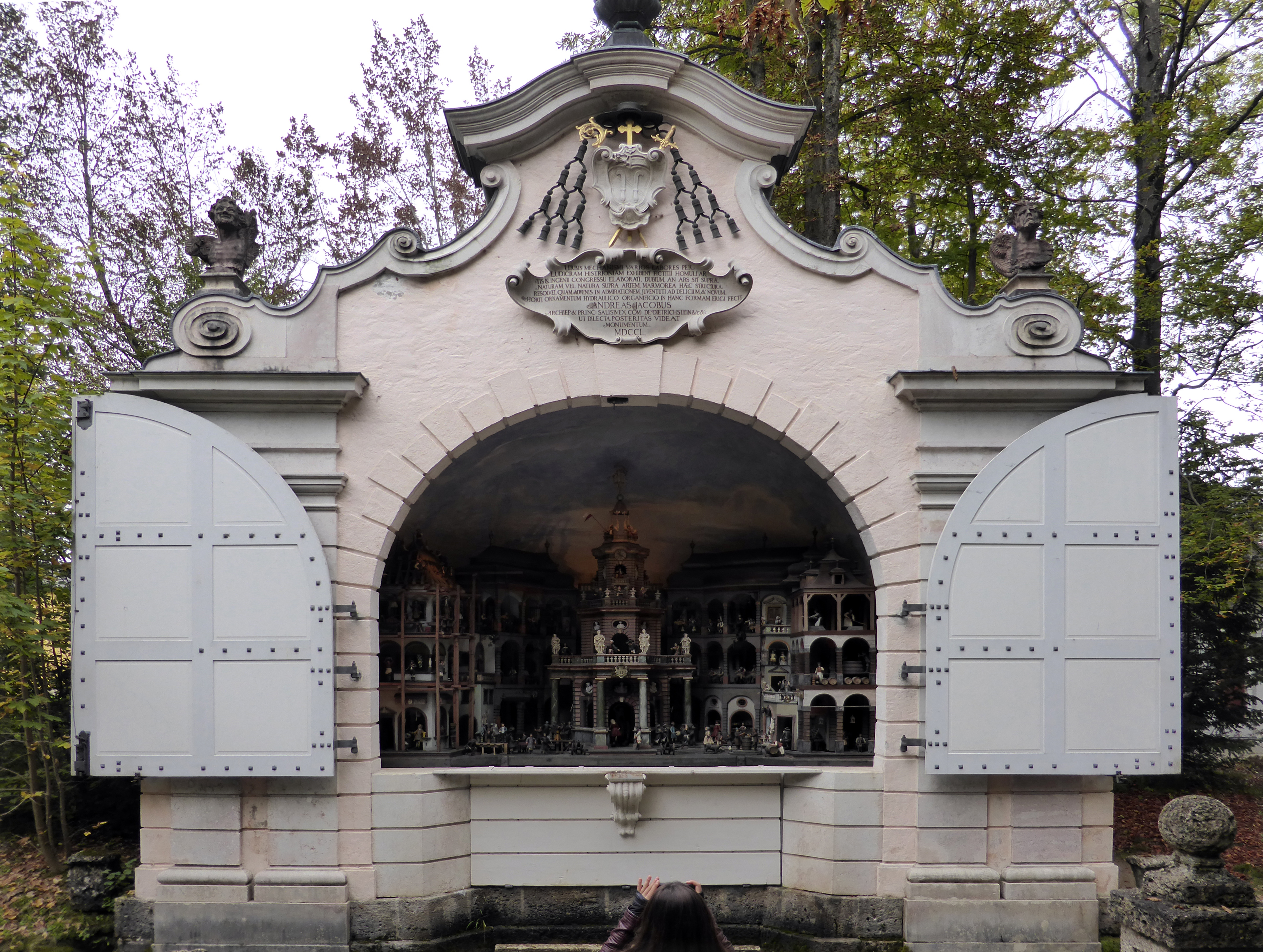 Wasserspiele Schloss Hellbrunn (mechanisches Theater), Salzburg.